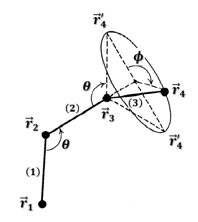 באיור זה ניתן לראות פולימר המורכב משלושה מונומרים באורך l המוצבים זה לעומת זה בשתי זוויות מרחביות